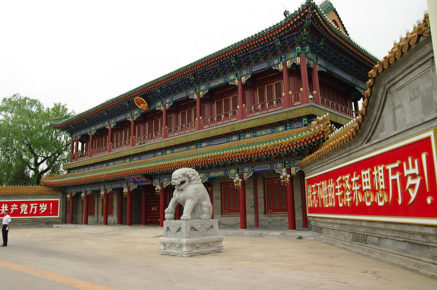 Xinhua-Tor am Zhongnanhai, Beijing